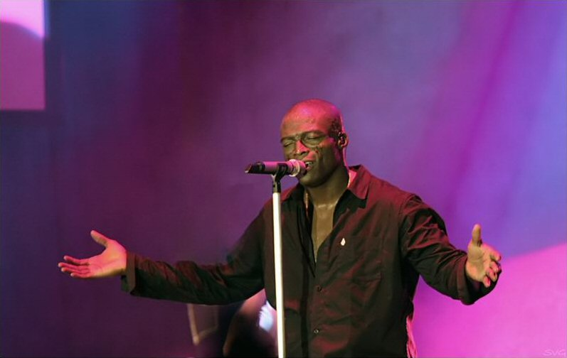 Seal aufgenommen in Frankfurt am Main.